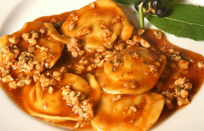 Ravioli di Faraona (ravioli of guinea fowl)